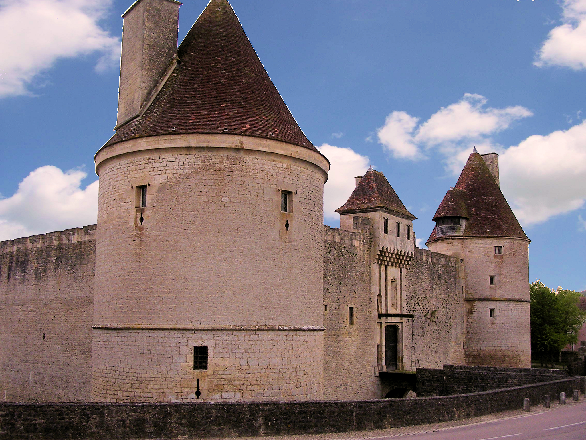 Posanges, Bourgogne, Côte-d'Or, le château de Posanges